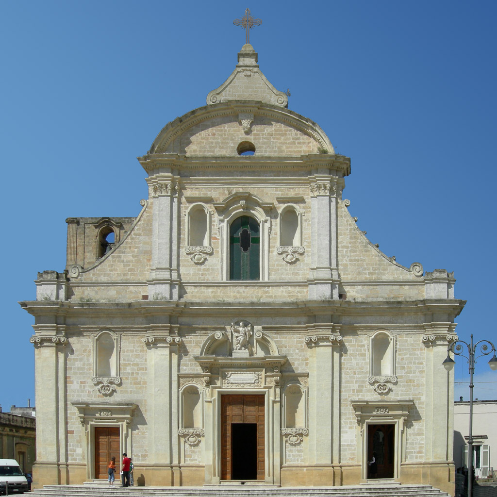 foto della chiesa madre di Guagnano, foto by mio fratello